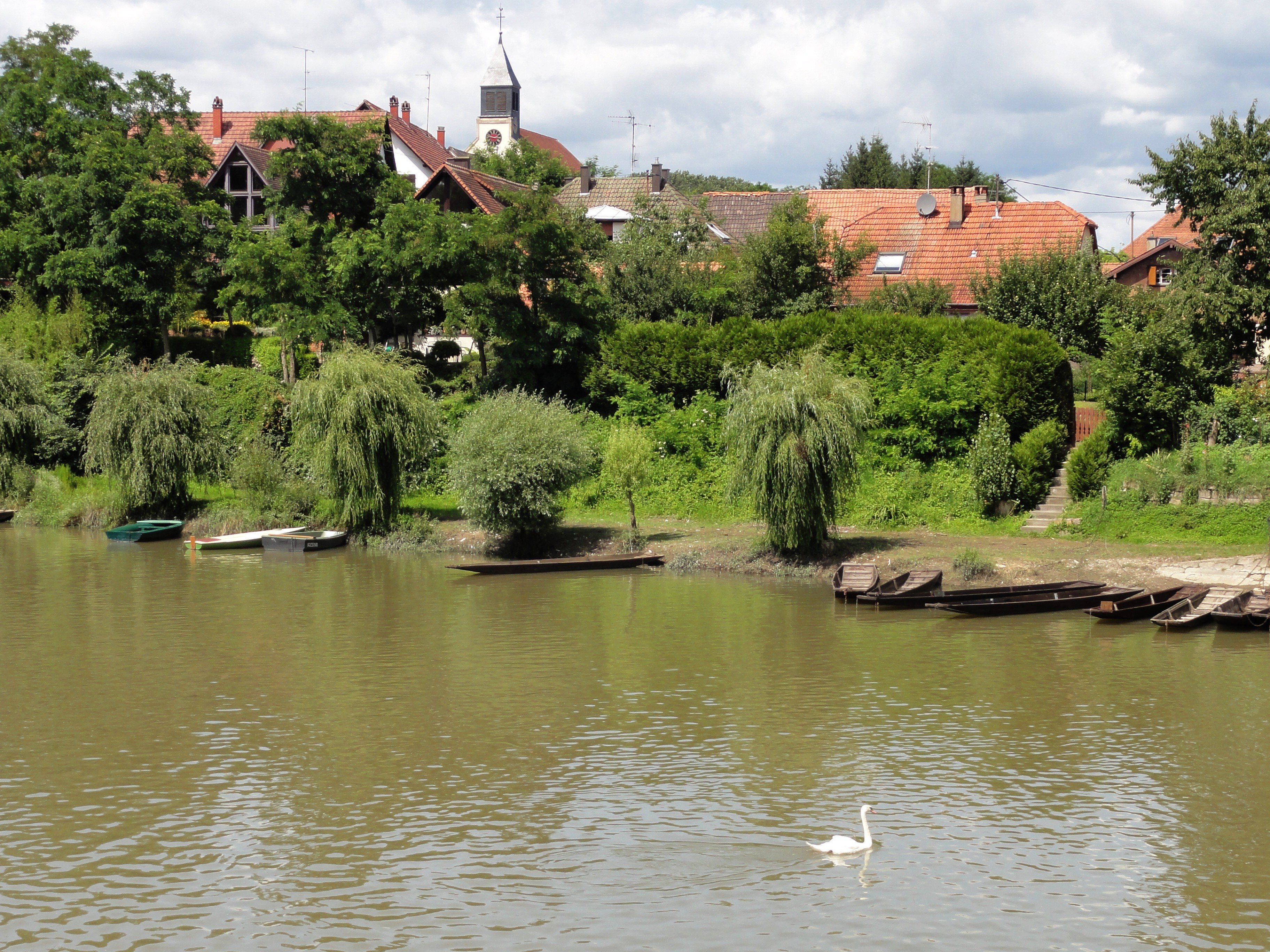 Alsace, Bas-Rhin, Munchausen, La Sauer.